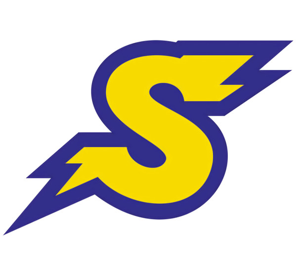 Logo le plus emblématique de Sharpnelsound, créé par FuriFuri Co. et utilisé de 2000 à 2018.